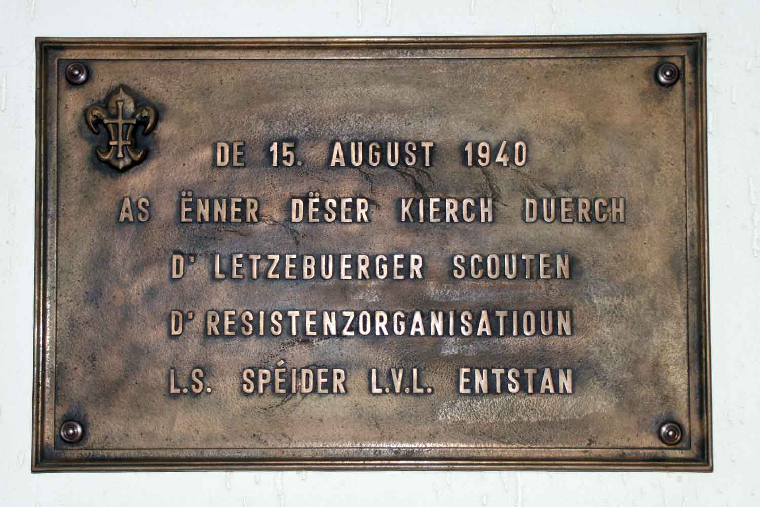 Grenzer Kierch Plack Scouten. Erënnerungsplack an der Kapell Chapelle Notre-Dame de la Résistance